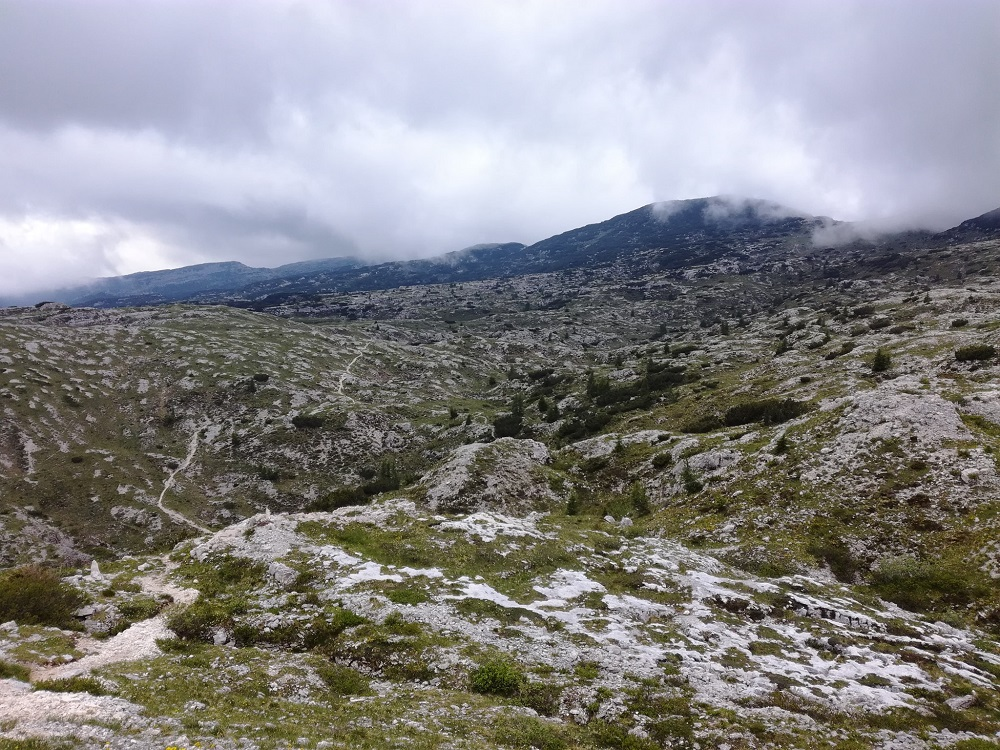 Zona nord dell'Ortigara